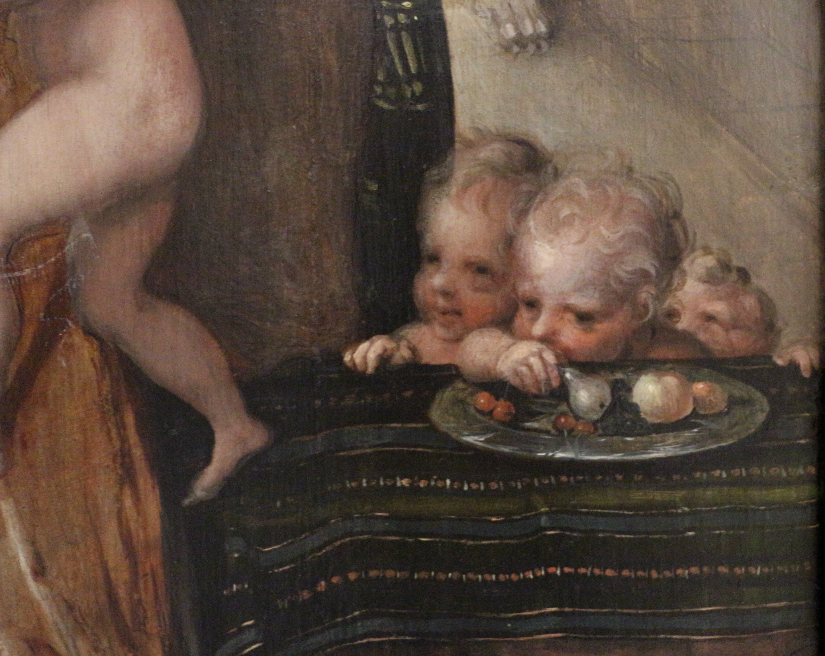 detailscuola di Fontainebleau